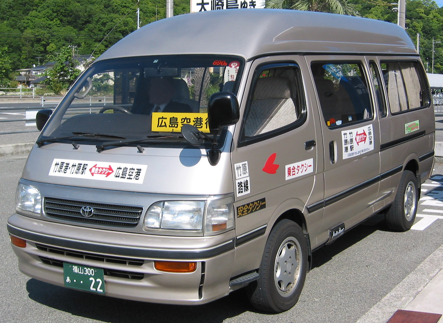 安全タクシー（広島県） 乗合タクシー竹原～広島空港線の車両